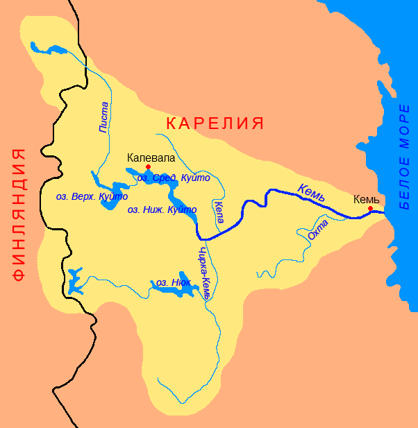 Схема бассейна реки Кемь (Карелия)